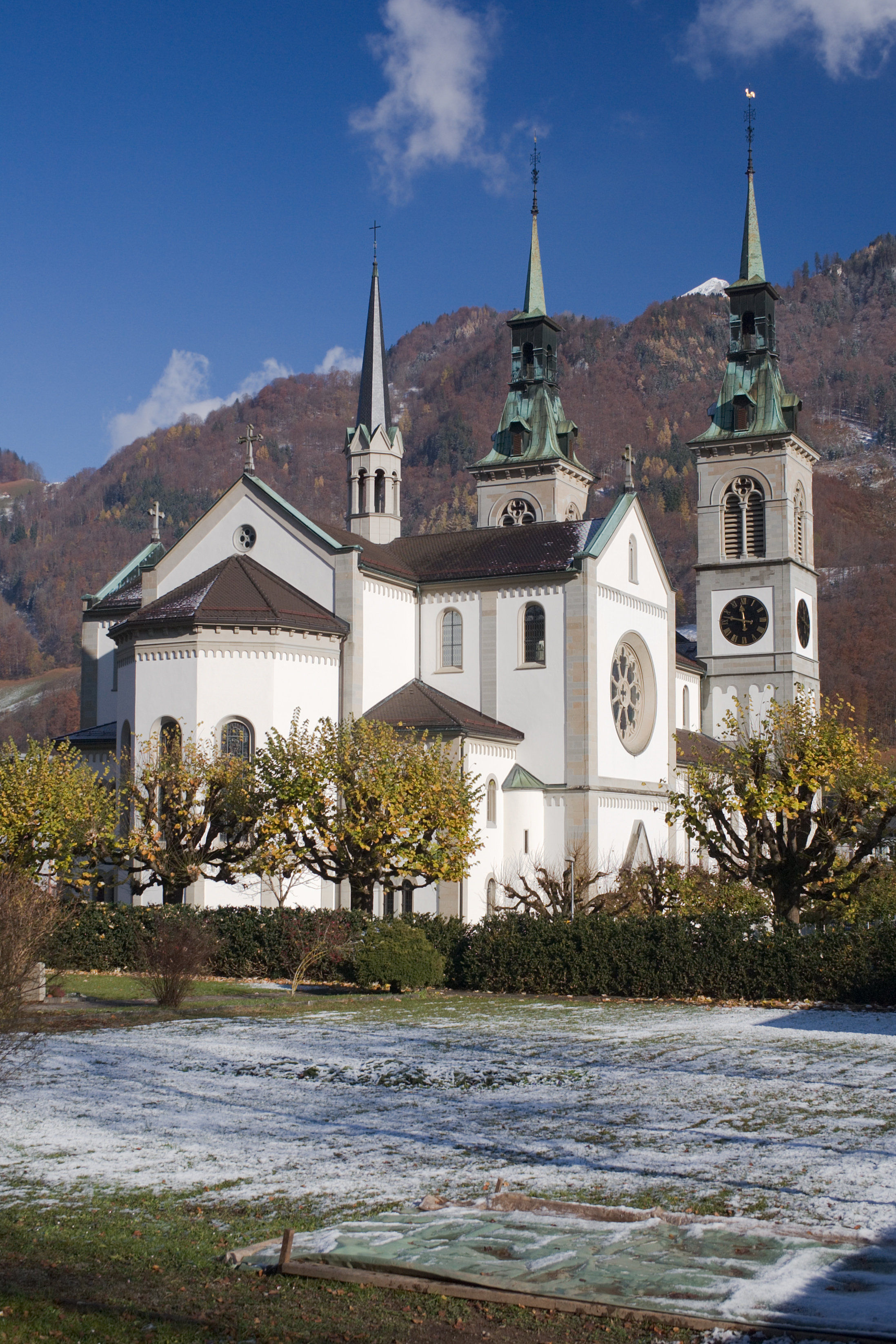 Stadtkirche Glarus vom Friedhof gesehen, Schweiz